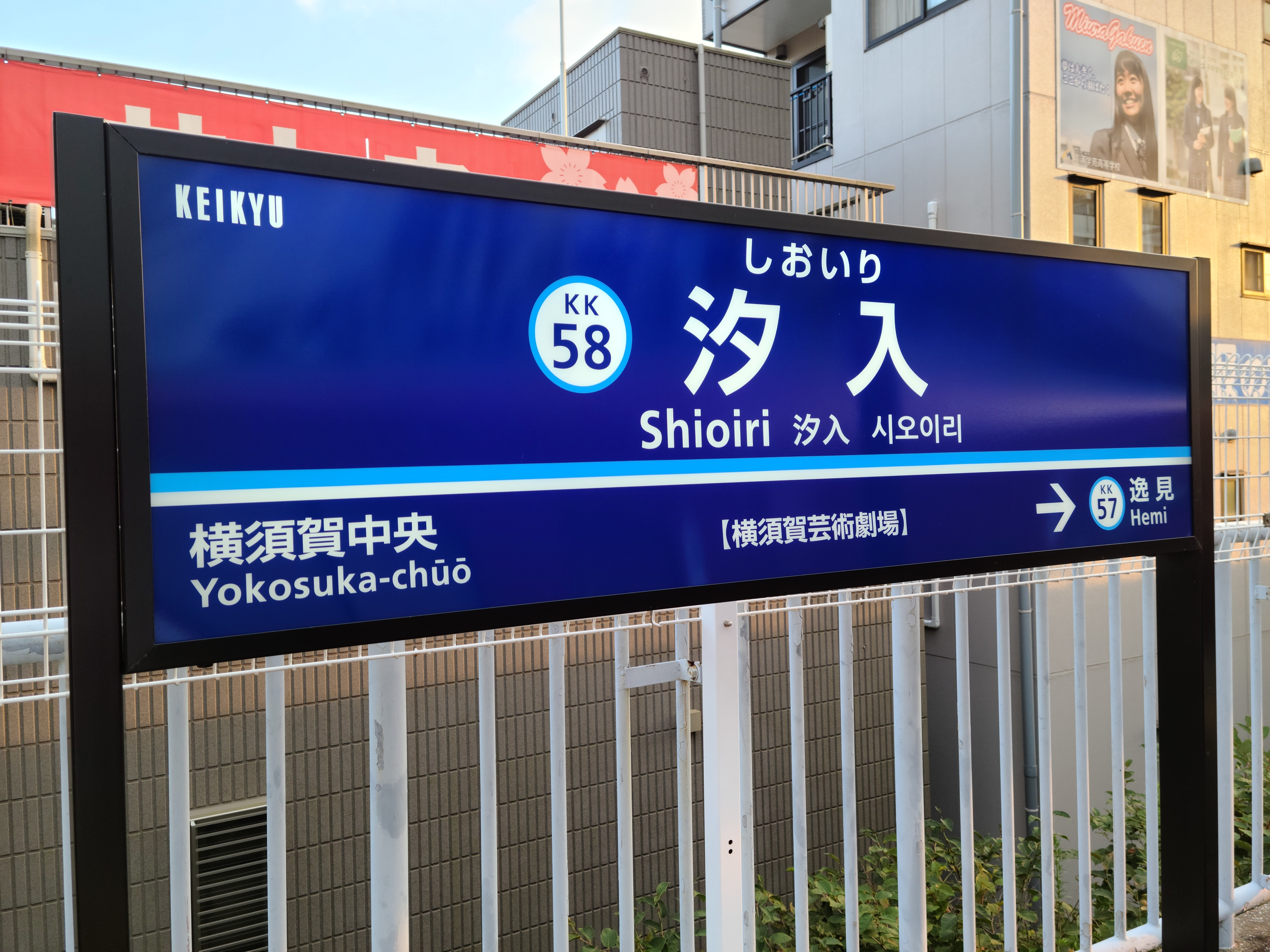 駅名標です。横須賀芸術劇場と書いてあります。